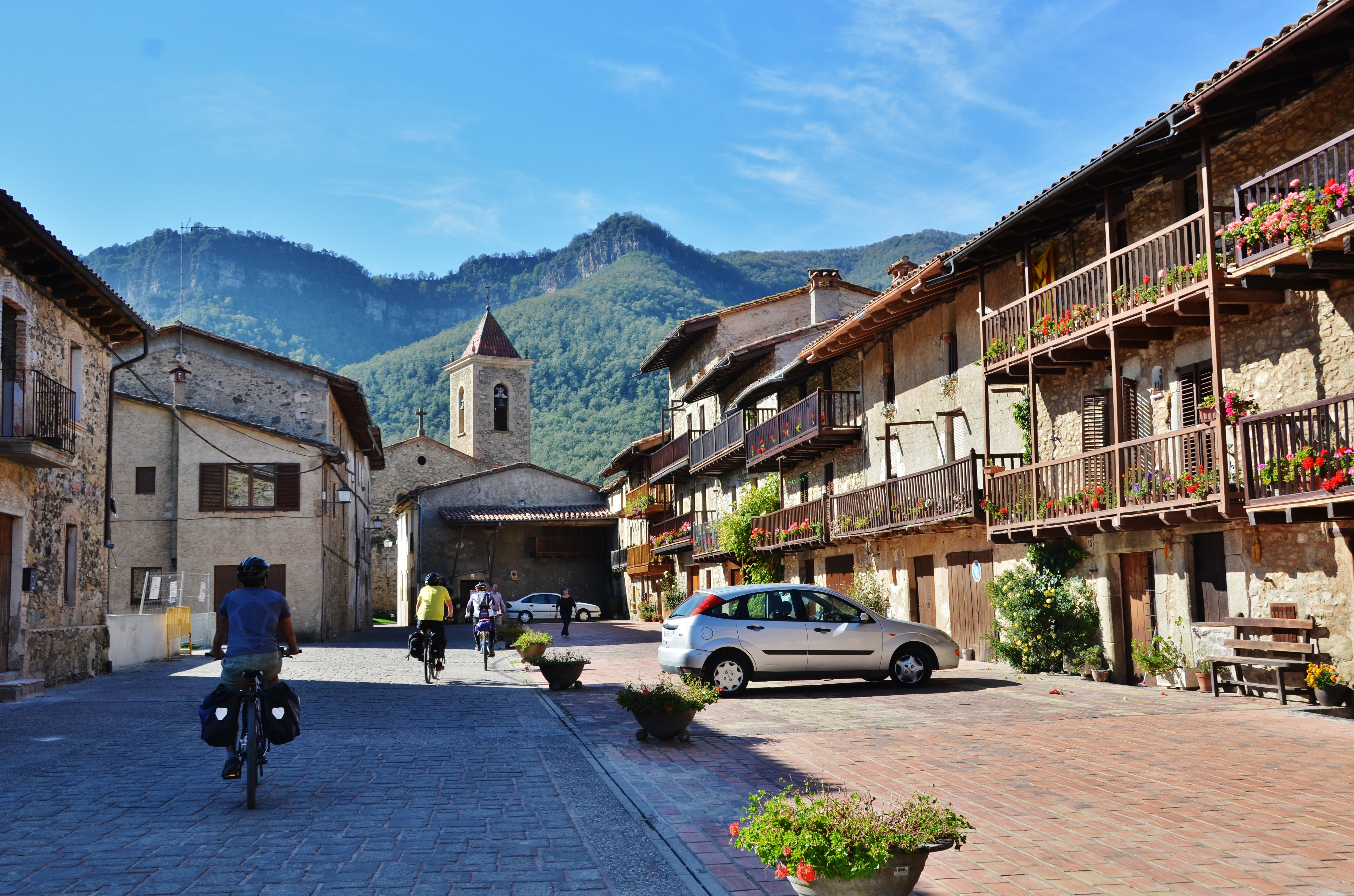 Carrer de Teixeda els Hostalets d'En Bas, La Vall d'En Bas, La Garrotxa